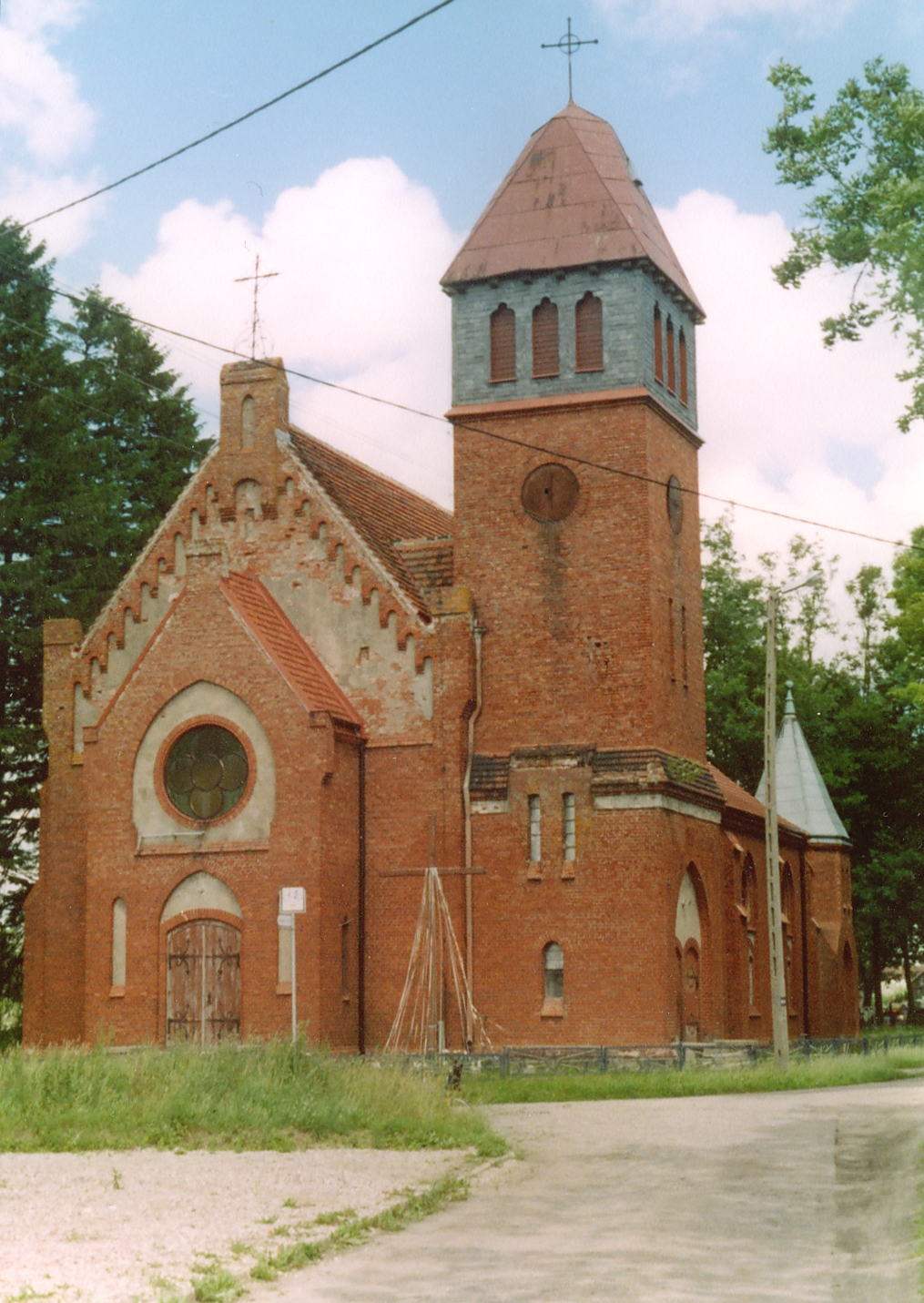 Pałowo